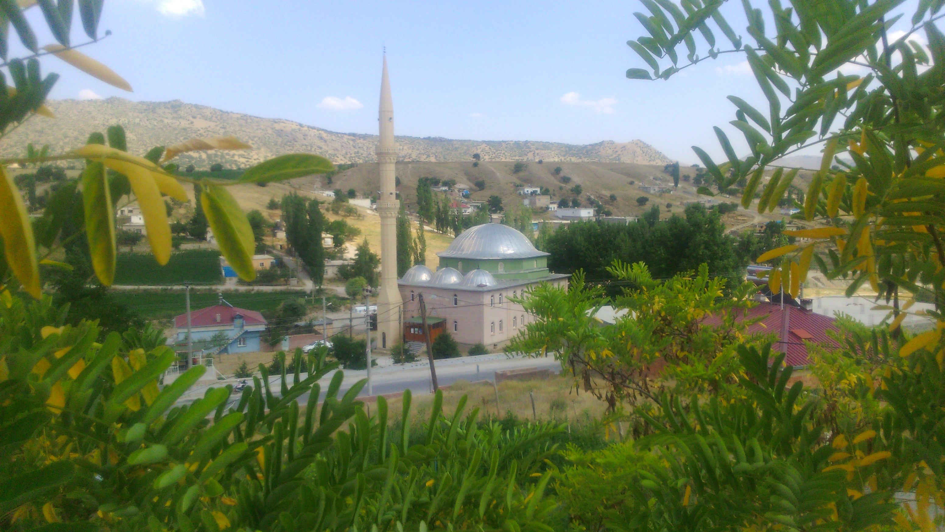 Bozköy Mehmet Akif Camii